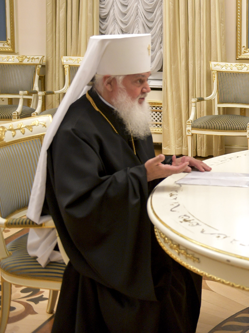 Зустріч Президента Порошенка з митрополитом Макарієм